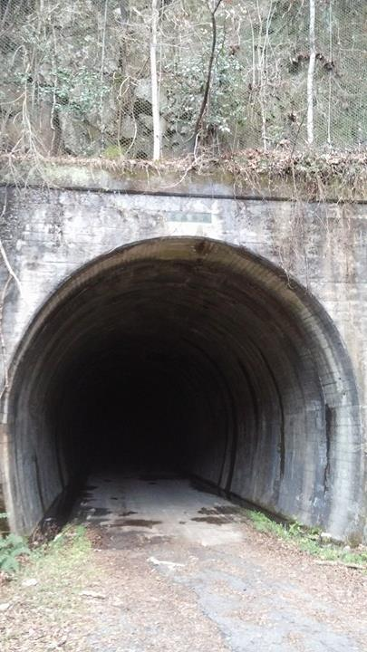 二股トンネル、戦時中に強制連行した中国人と朝鮮人に強制労働させてつくったトンネル。現在は心霊スポットとされる。